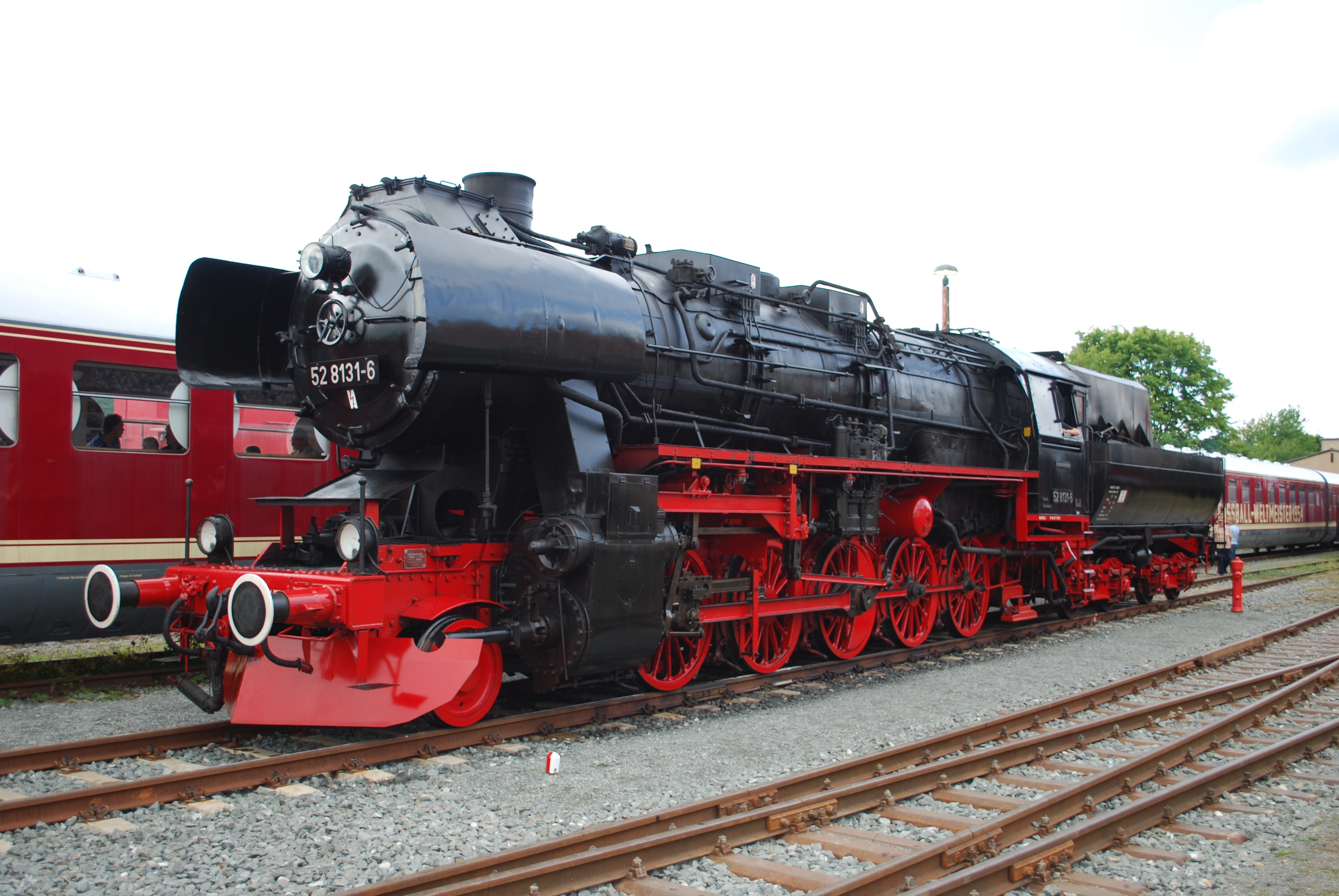 DRB Class 52 "Kriegslok" 52 8131 with snow ploughs and 2'2'T30 semi-spherical tender, built in Second World War and rebuilt in 1965 by DR with new welded "Reko" boiler and Heinl feed water heater, one of 200 rebuilt 1960–67. 6,303 Class 52's were built 1942–50. At the Meiningen Steam Festival.